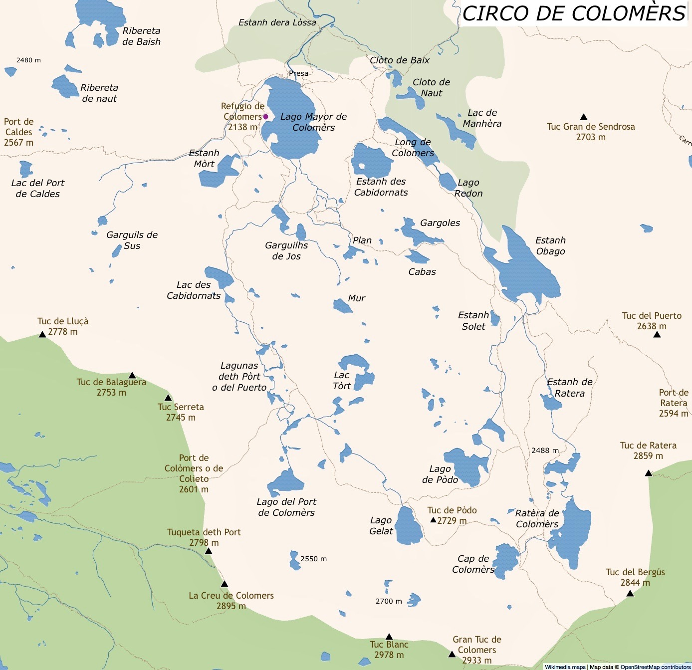 Nomenclatura de lagos y cimas más importantes del Circo de Colomers